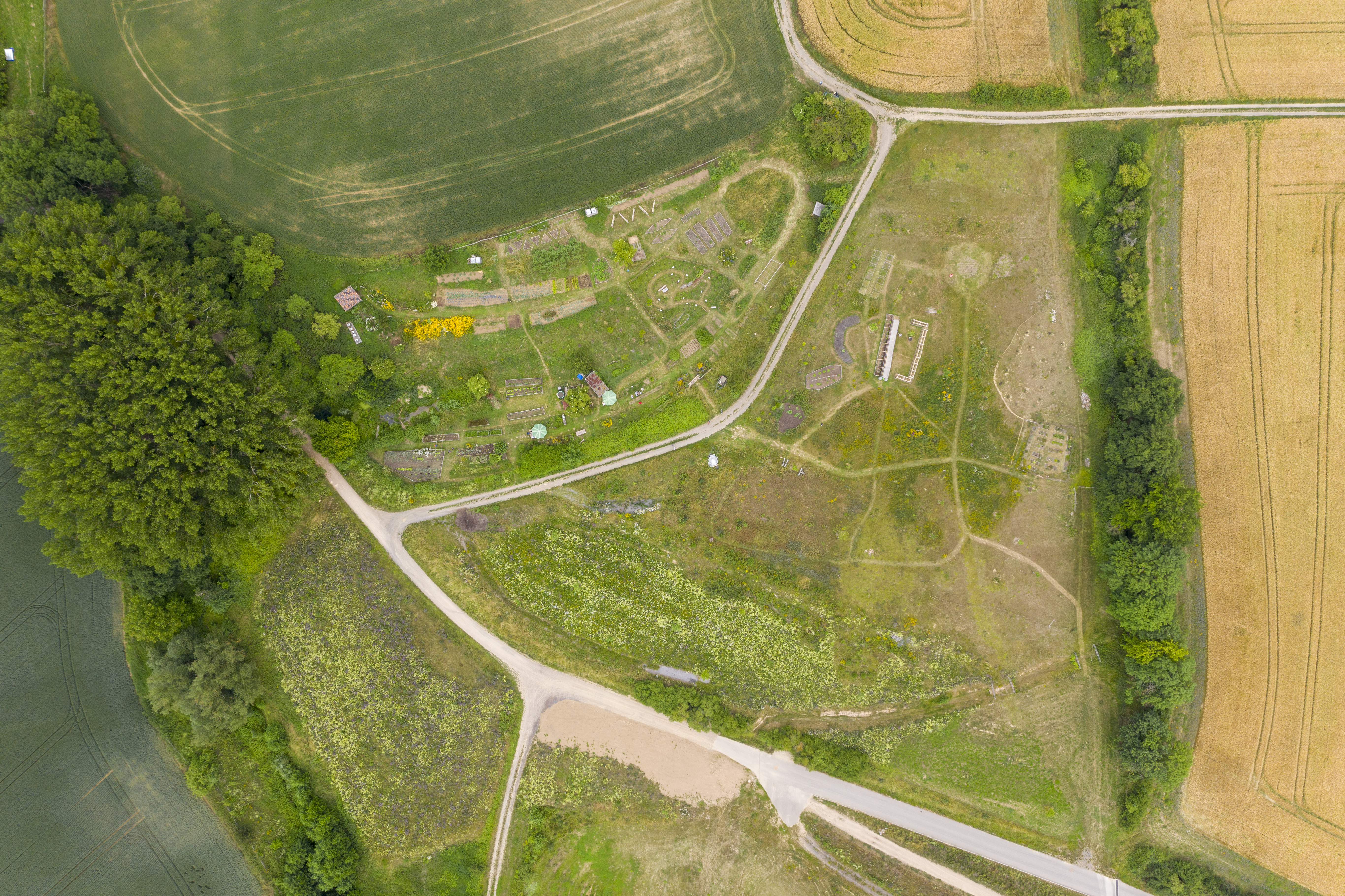 Drohnenaufnahme des Geländes